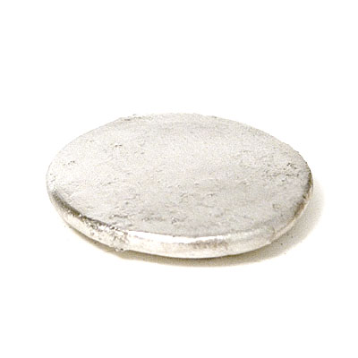 Színezüstből öntött, kézi éremveréshez, vagy szabadon sajtoláshoz előkészített lapka.